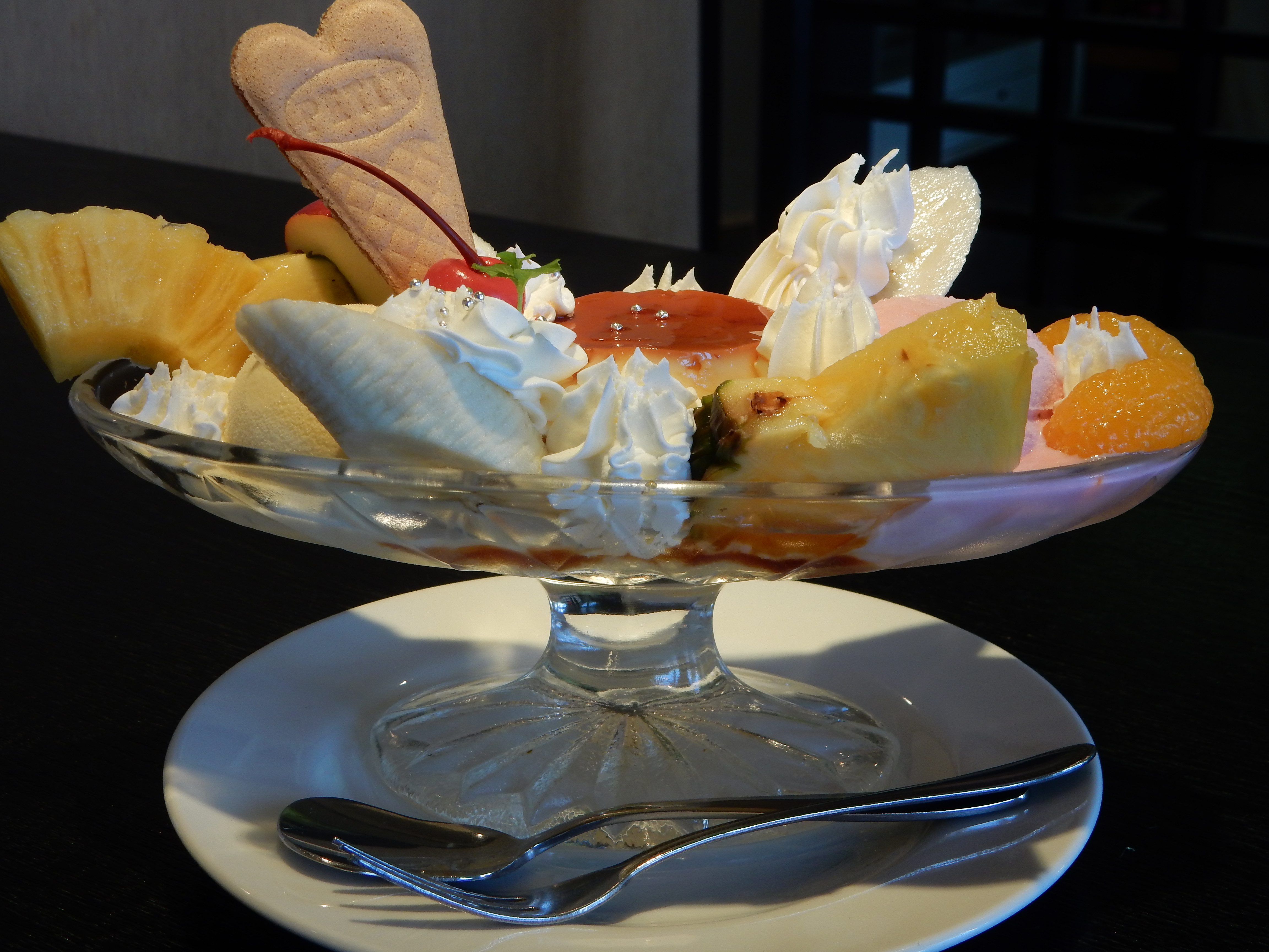 プリンアラモード